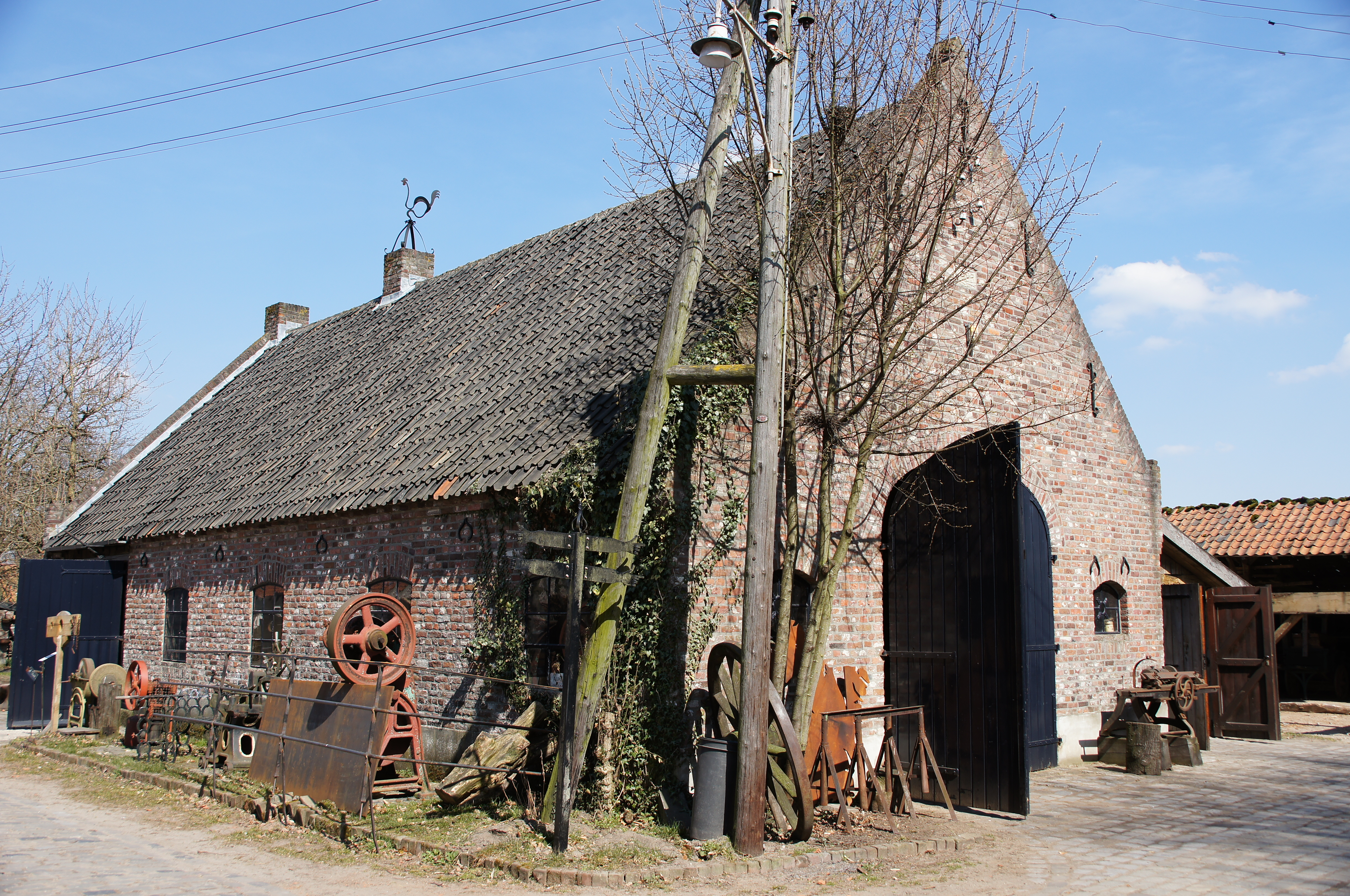 Limburgs Openluchtmuseum Eynderhoof, smederij "Sint Eloy" is het derde gebouw dat werd opgericht in Eynderhoof. De smid en koperslager hebben hier hun werkplaatsen